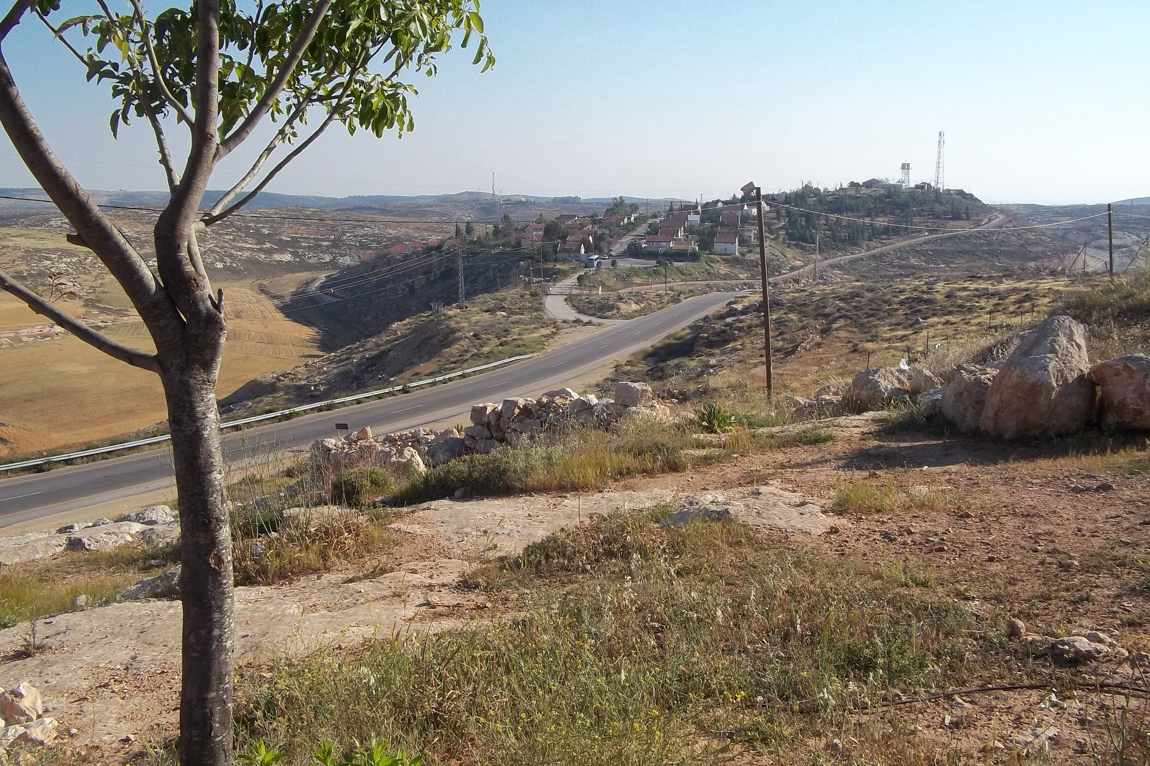 מצפה אשתמוע דרום הרי חברון